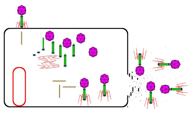 De faag injecteert zijn genoom, dat de bacteriecel aanzet tot aanmaak van nieuwe faagonderdelen en uiteindelijk tot assemblage ervan. zelf gemaakt